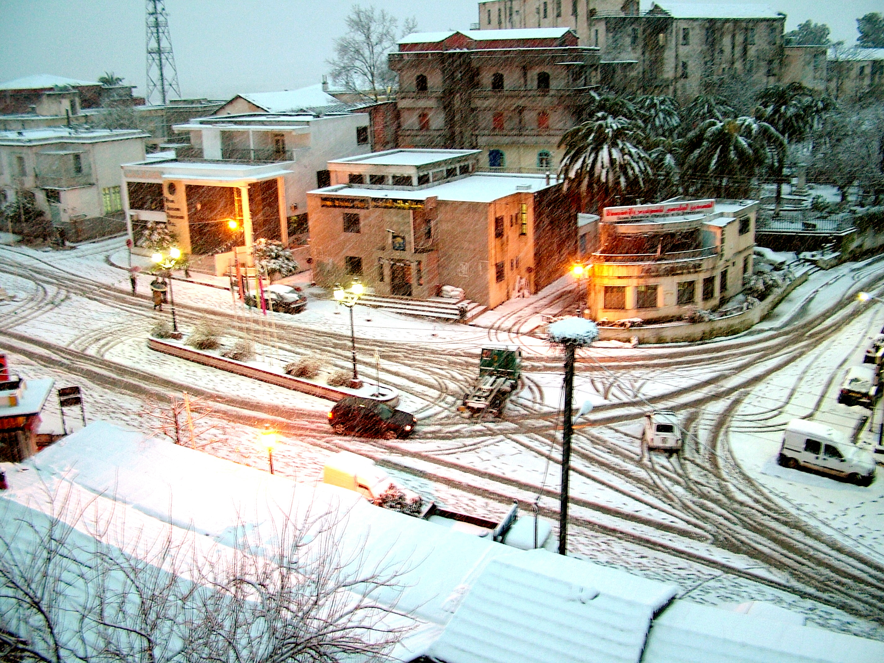 La Place d'El Milia (Algérie) sous la neige.